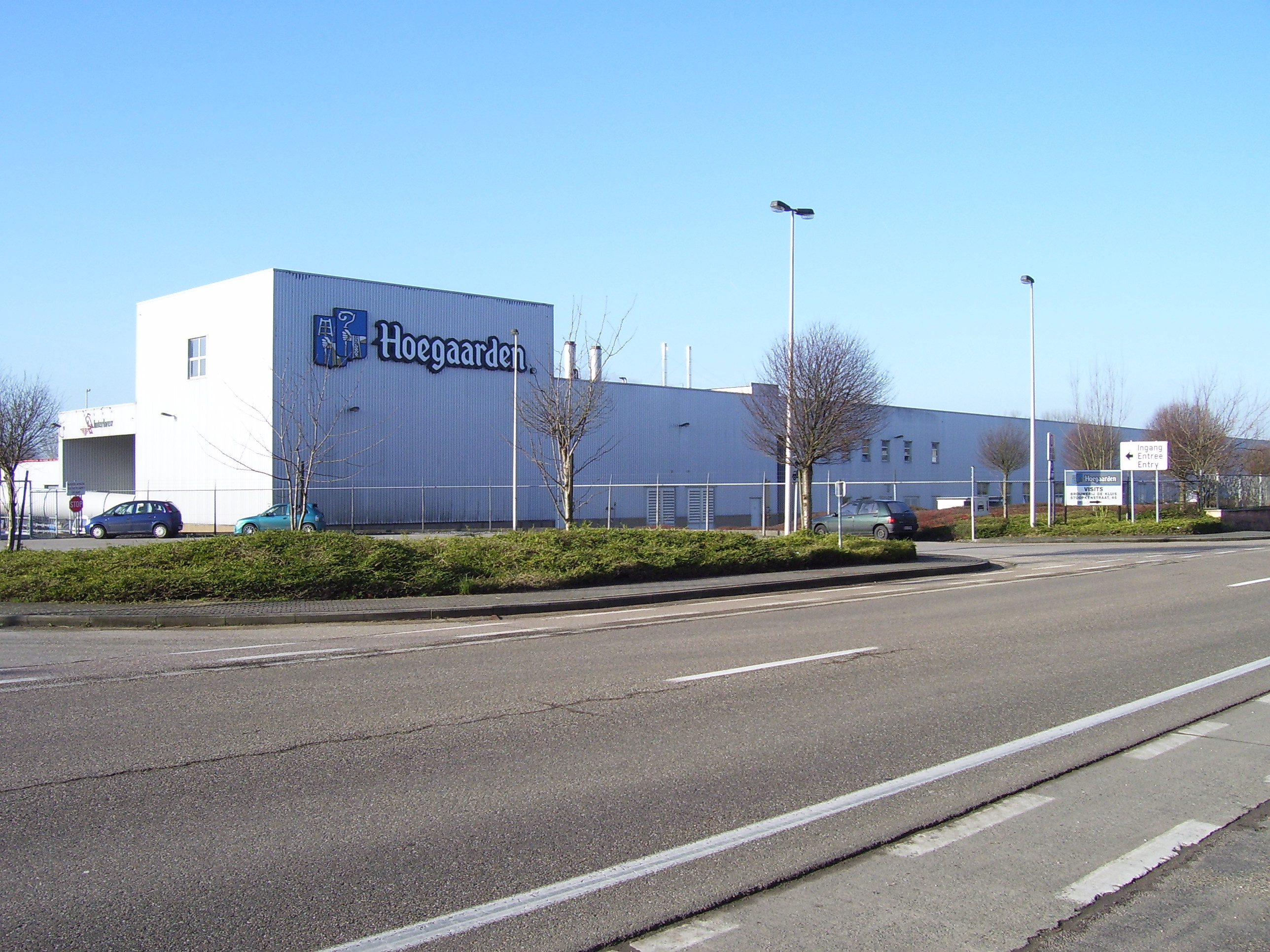 Brewery Hoegaarden in Hoegaarden, Belgium